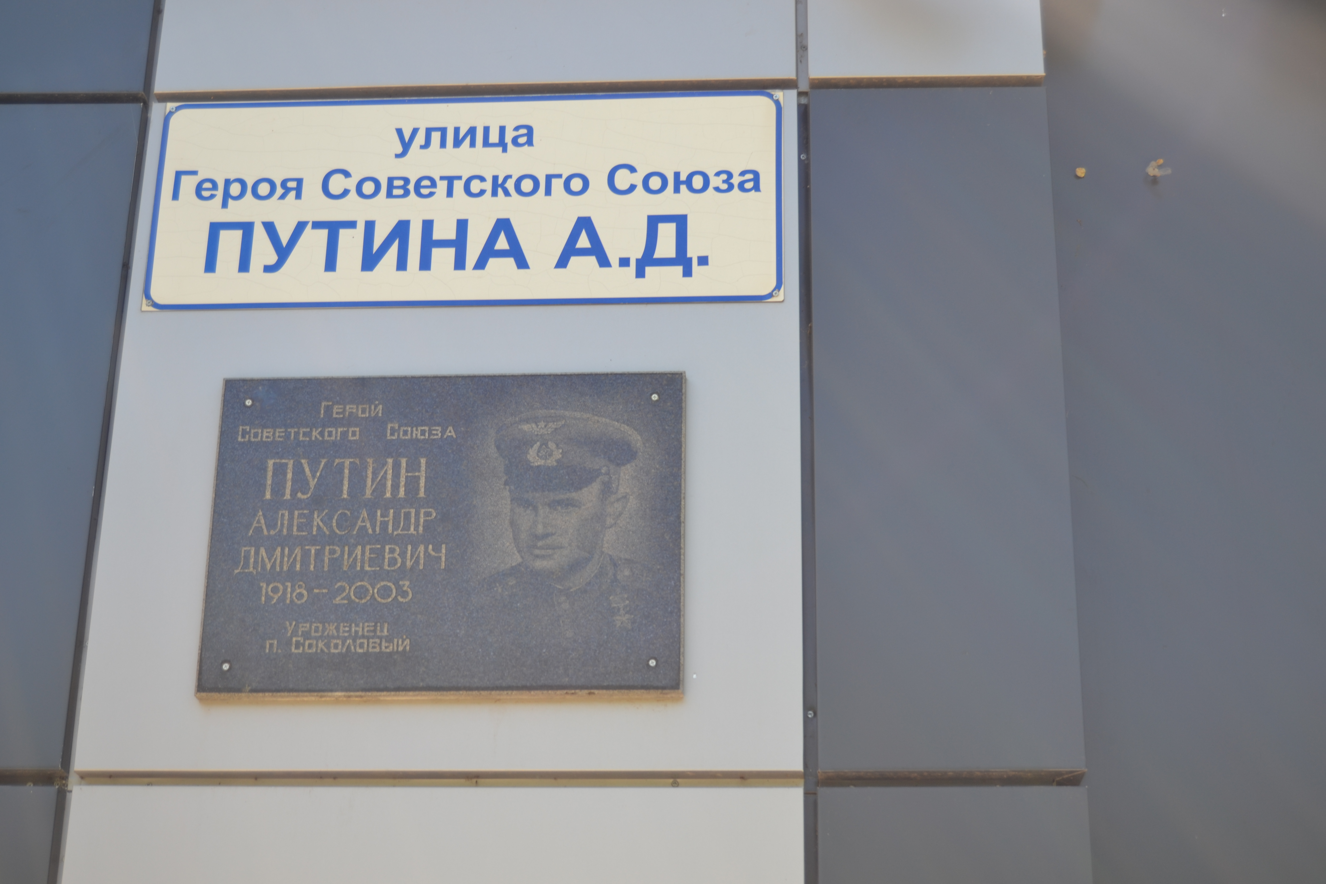 Изображение населённого пункта. Мемориальная доска и улица имени Путина А.Д. (Соколовый)